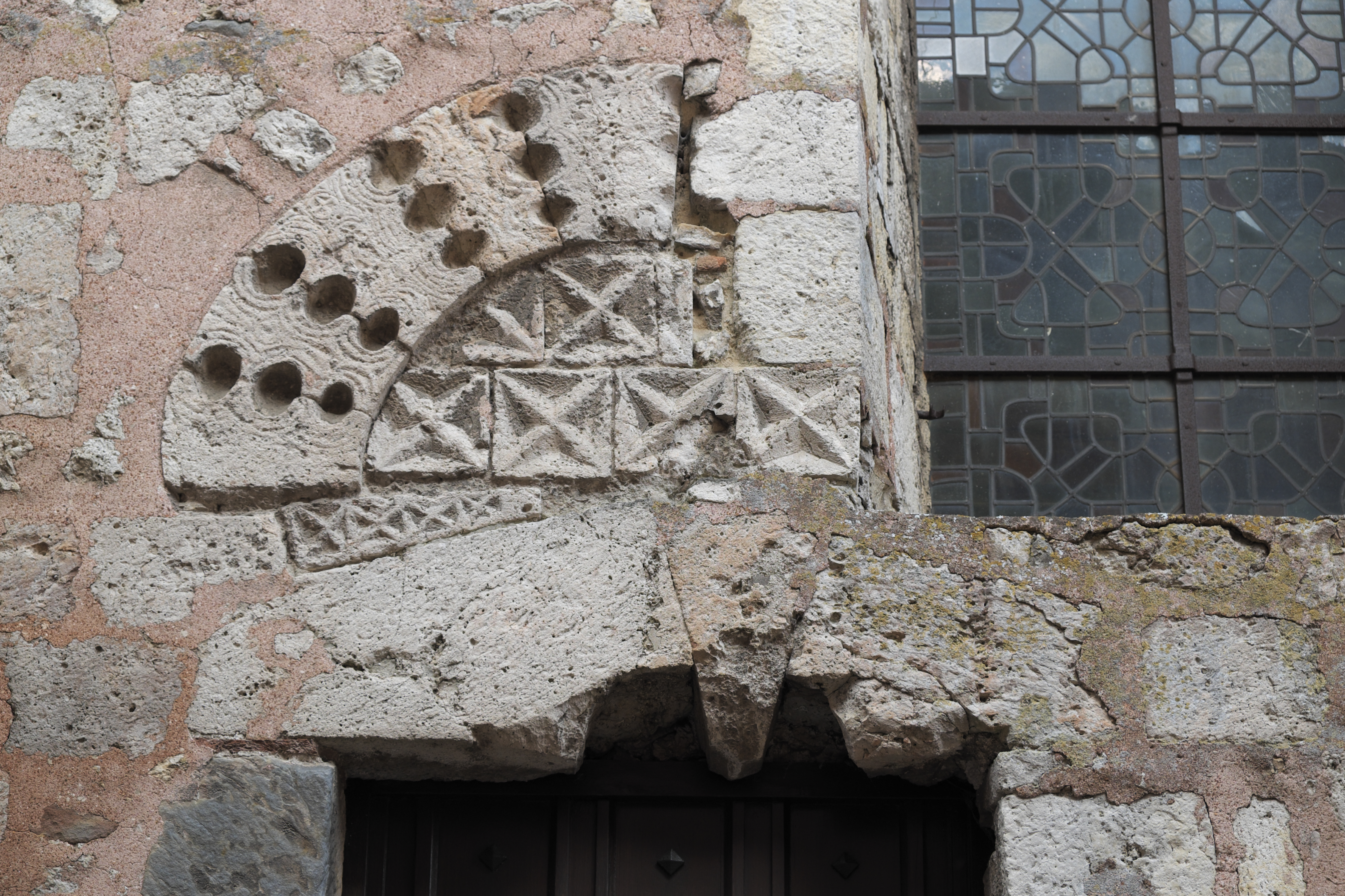 Katholische Kirche Saint-Pierre in Épernon im Département Eure-et-Loir (Centre-Val de Loire/Frankreich), Portal an der Westfassade mit Wiederverwendung romanischer Fragmente .